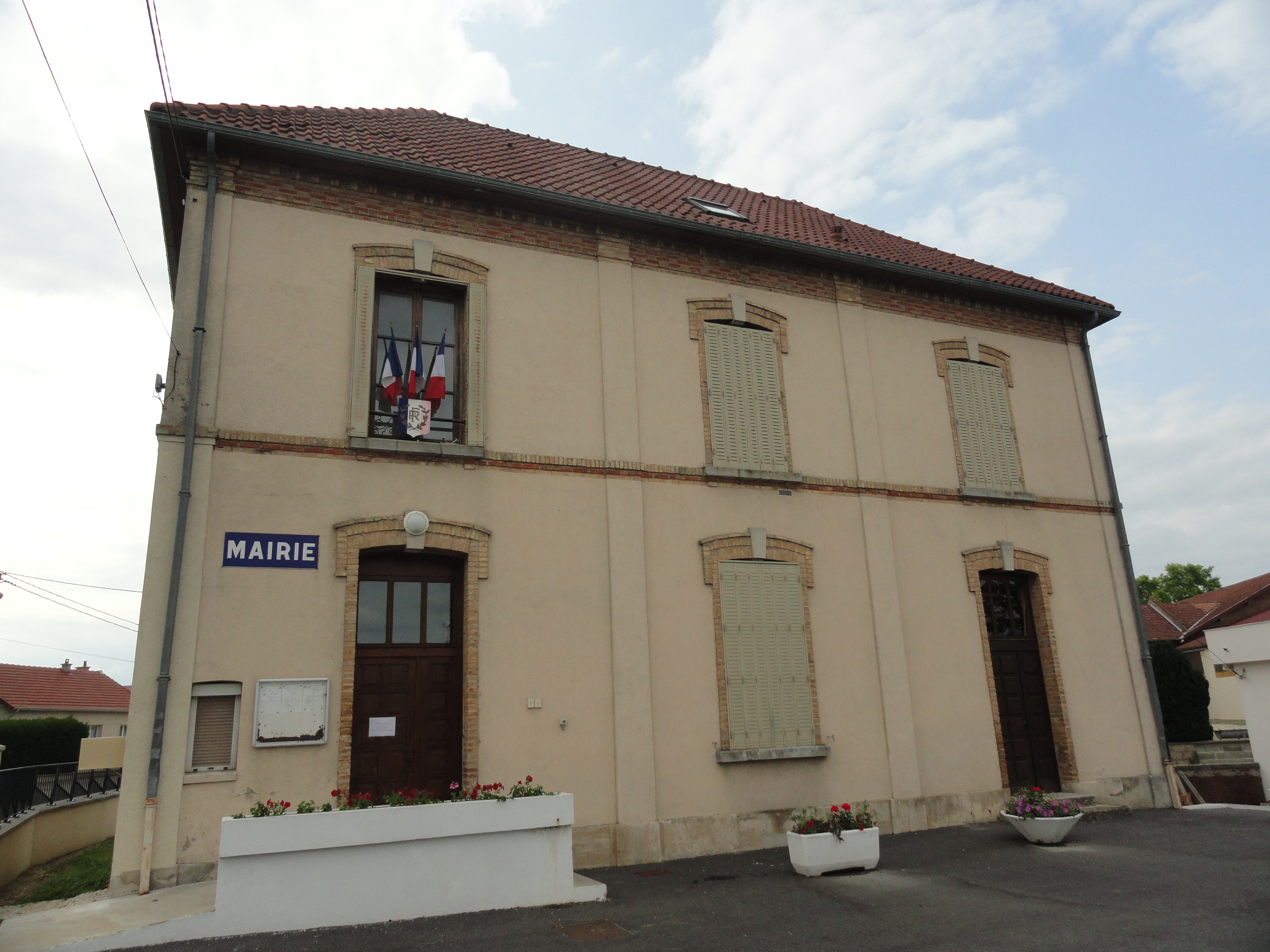 La mairie de Pringy (51).